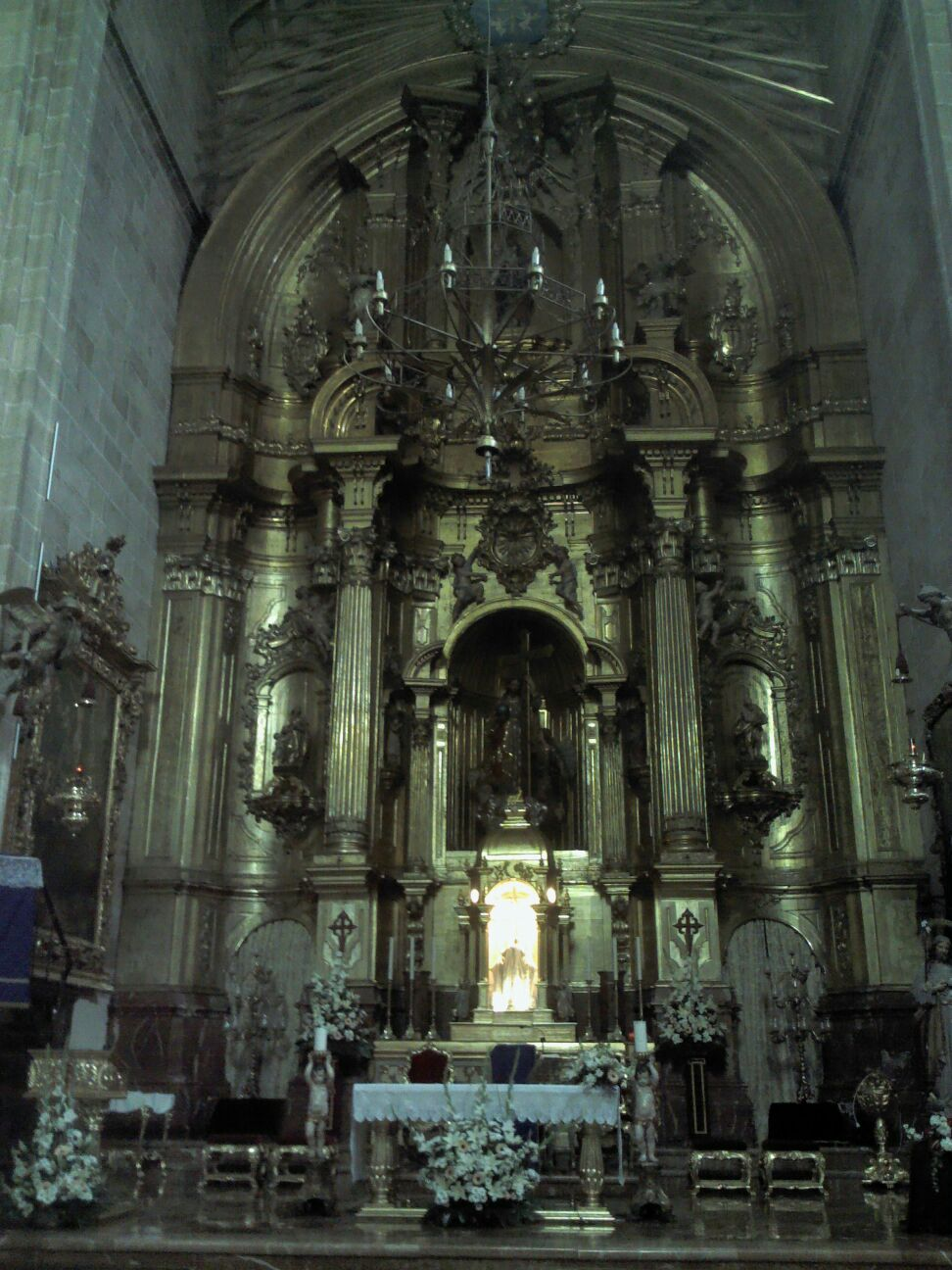 Retablo Mayor. Procedente de la iglesia de Los Jesuitas, 1758.